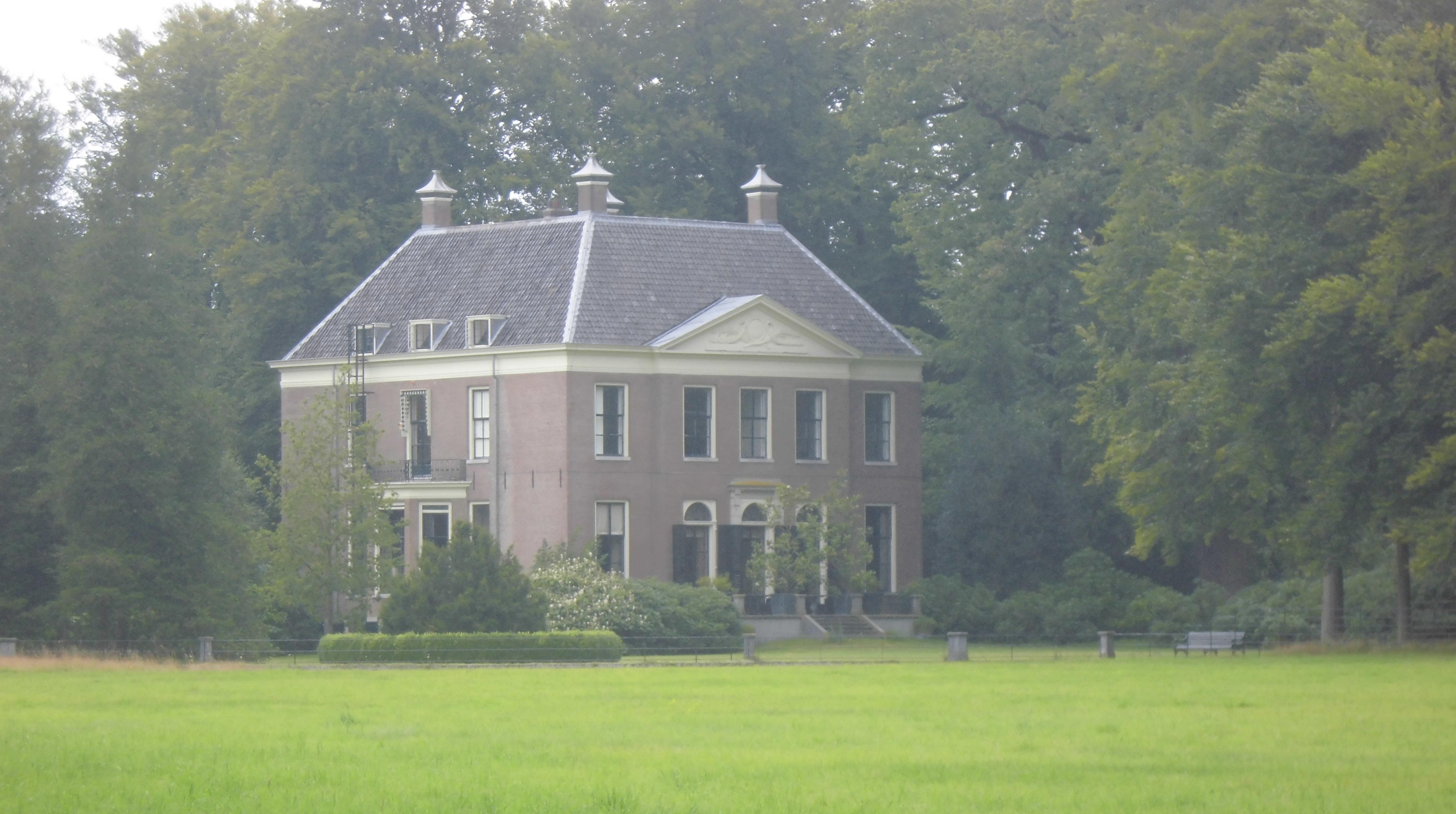 Gooilust 's-Graveland